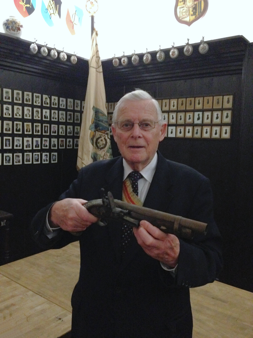 Fotografie von Egbert Weiß im Corpshaus der Lusatia Leipzig.